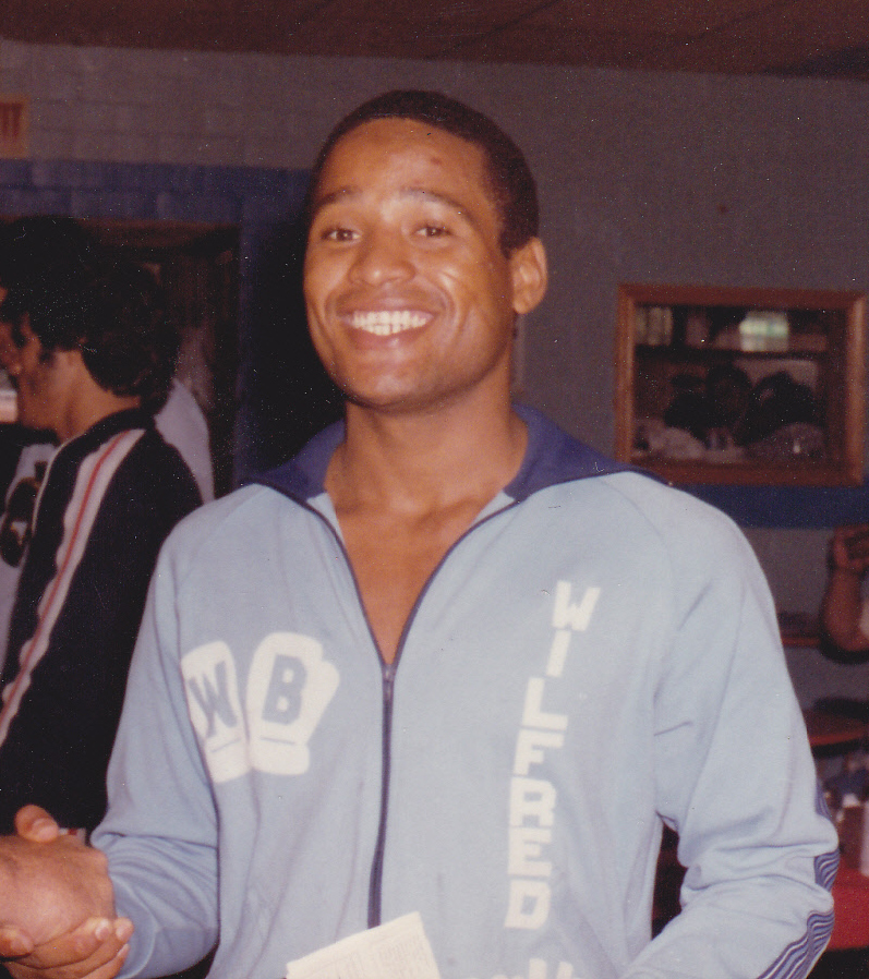 Wilfred Benítez